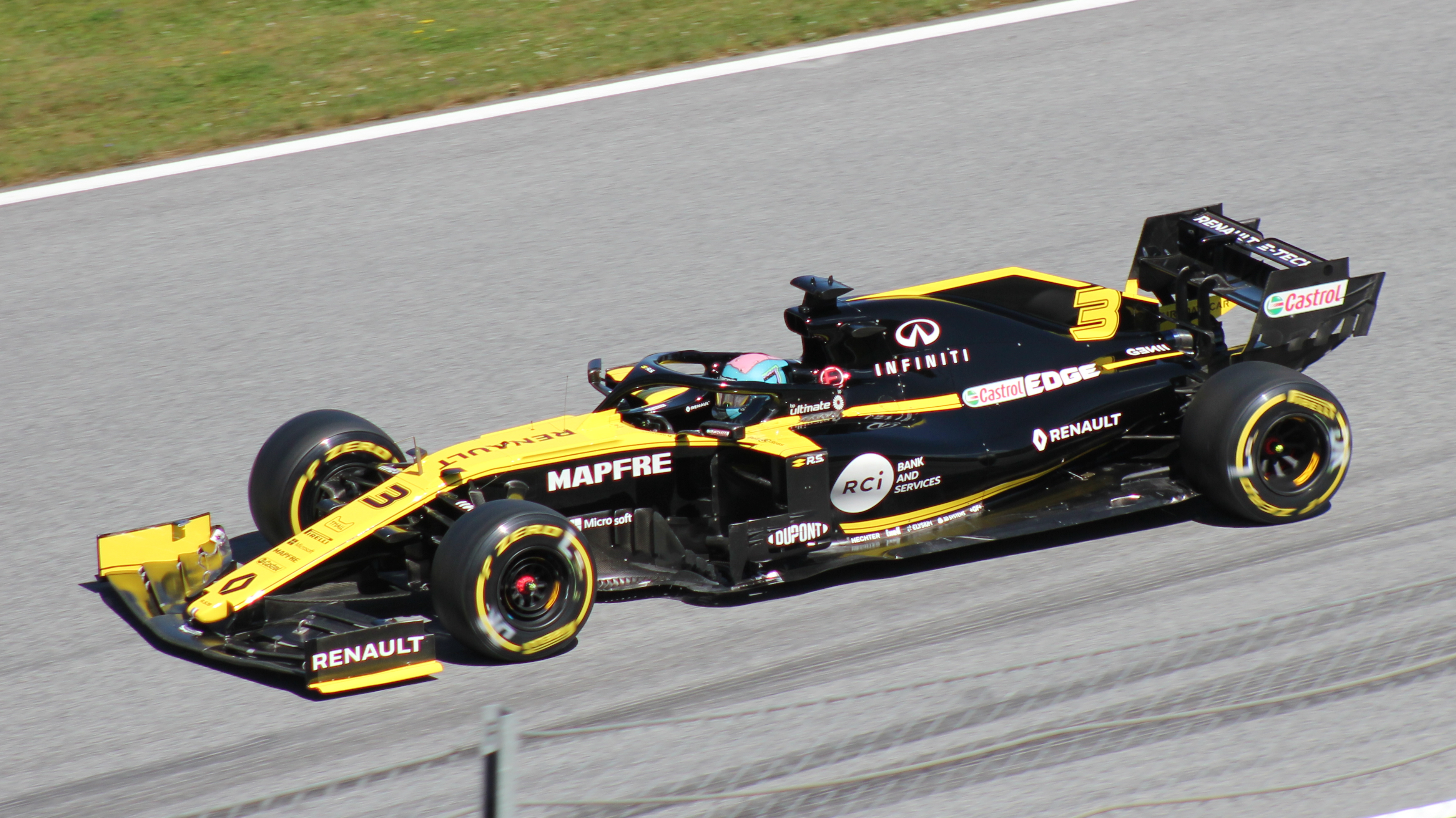 Ricciardo beim Rennwochenende in Österreich 2019